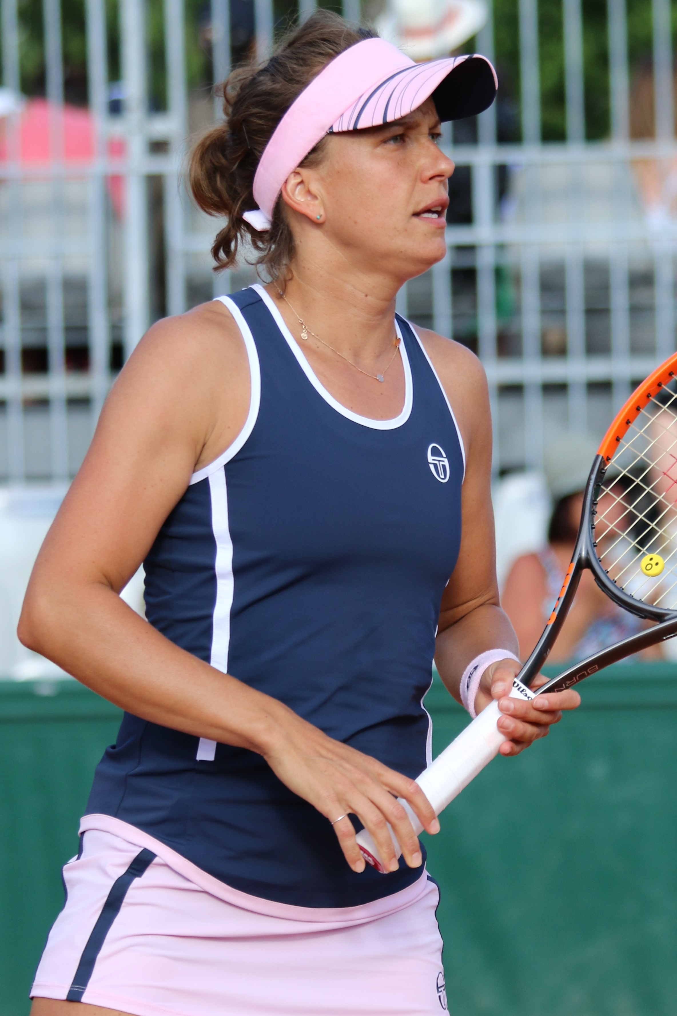 Strycova RG18